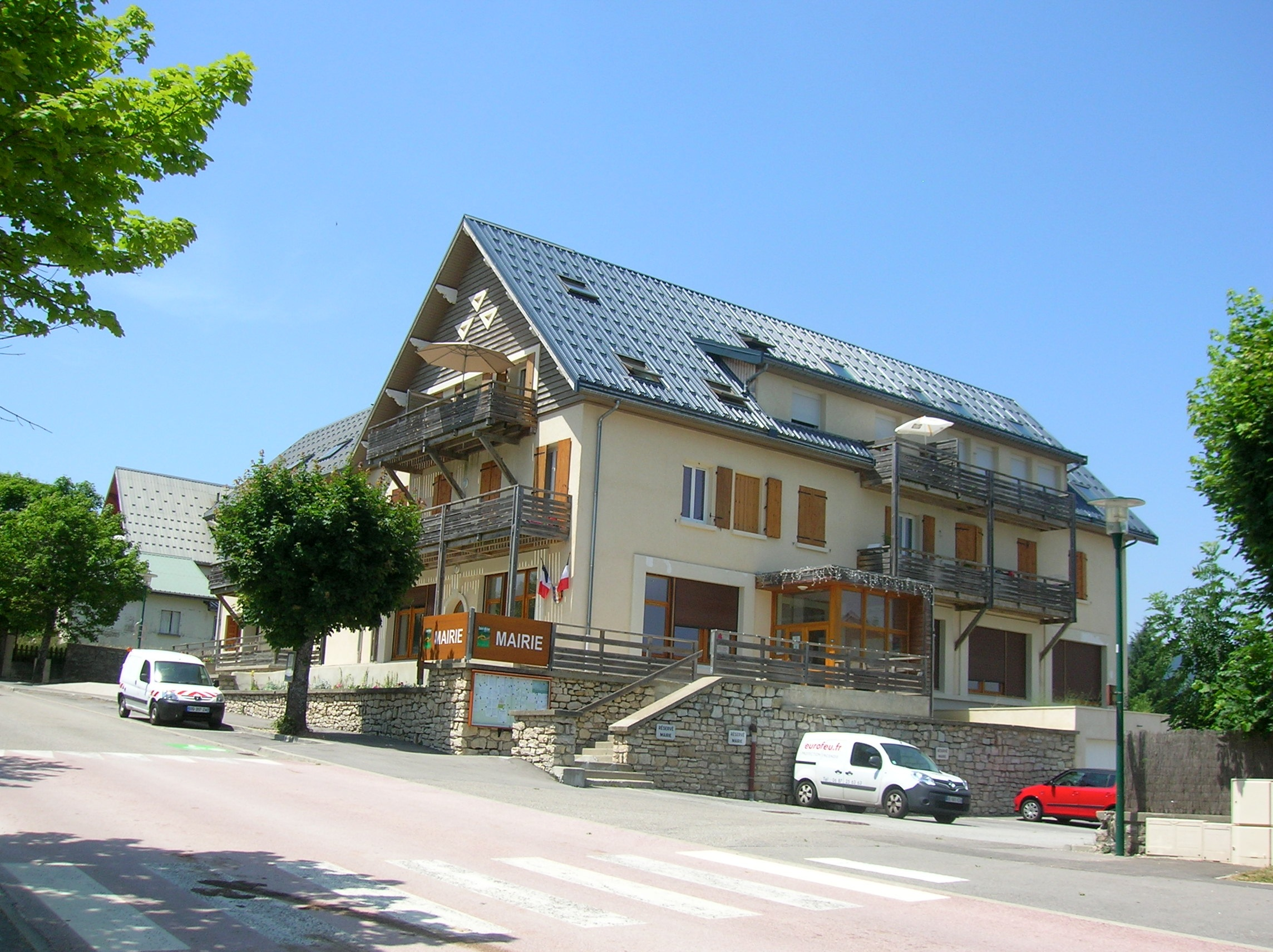 Saint-Nizier-du-Moucherotte, Isère, France.